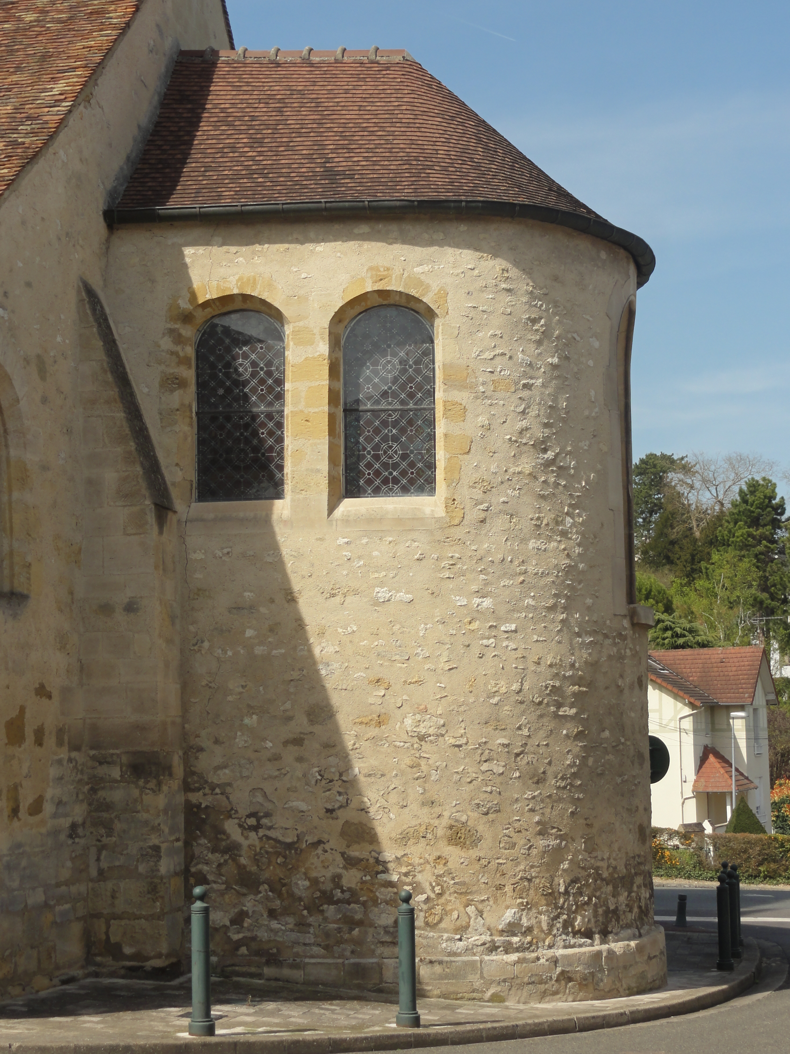 Église Saint-Germain-de-Paris de Hardricourt - voir titre.